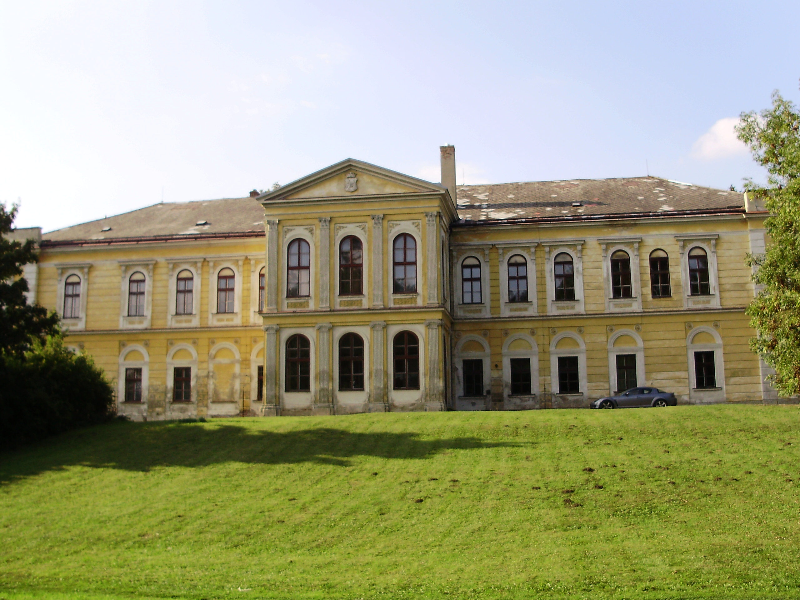 Zámek Bohdalice